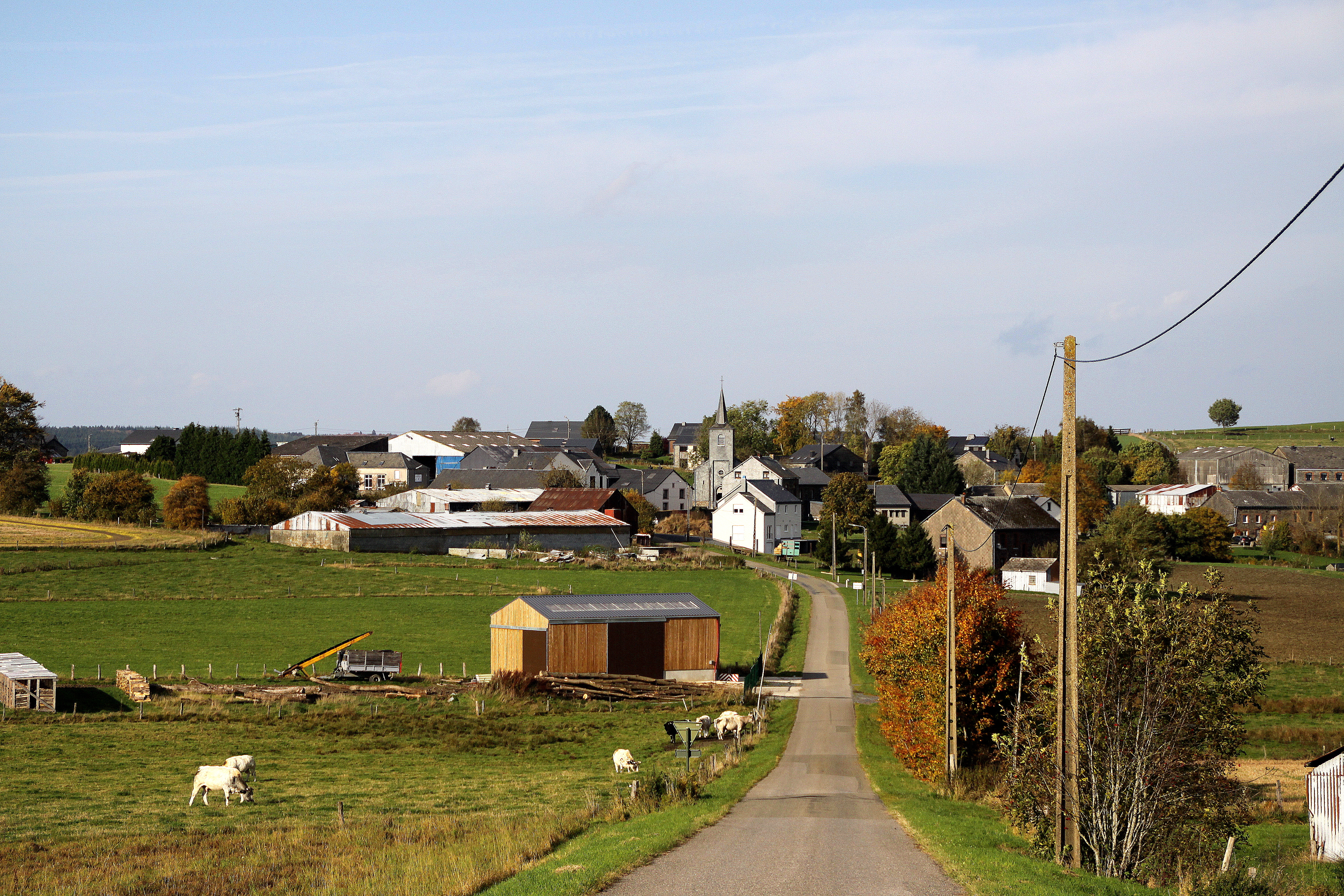 Flamierge vu Süde gesinn